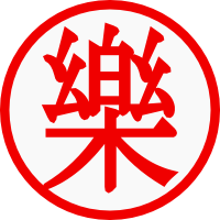 Logotipo de Yamcha en el manga Dragon Ball